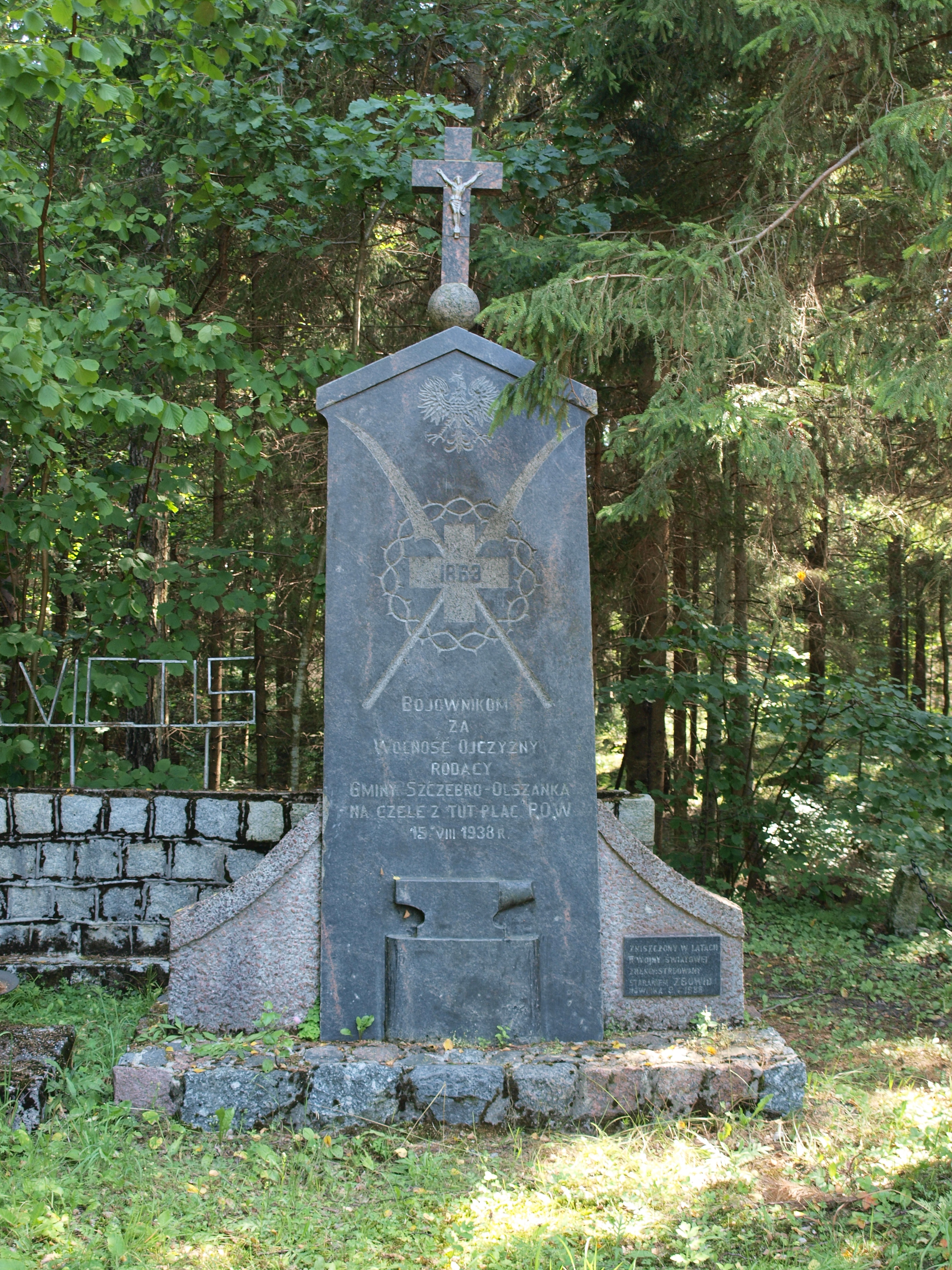 Uroczysko Powstańce w Puszczy Augustowskiej - pomnik ku czci powstańców styczniowych.